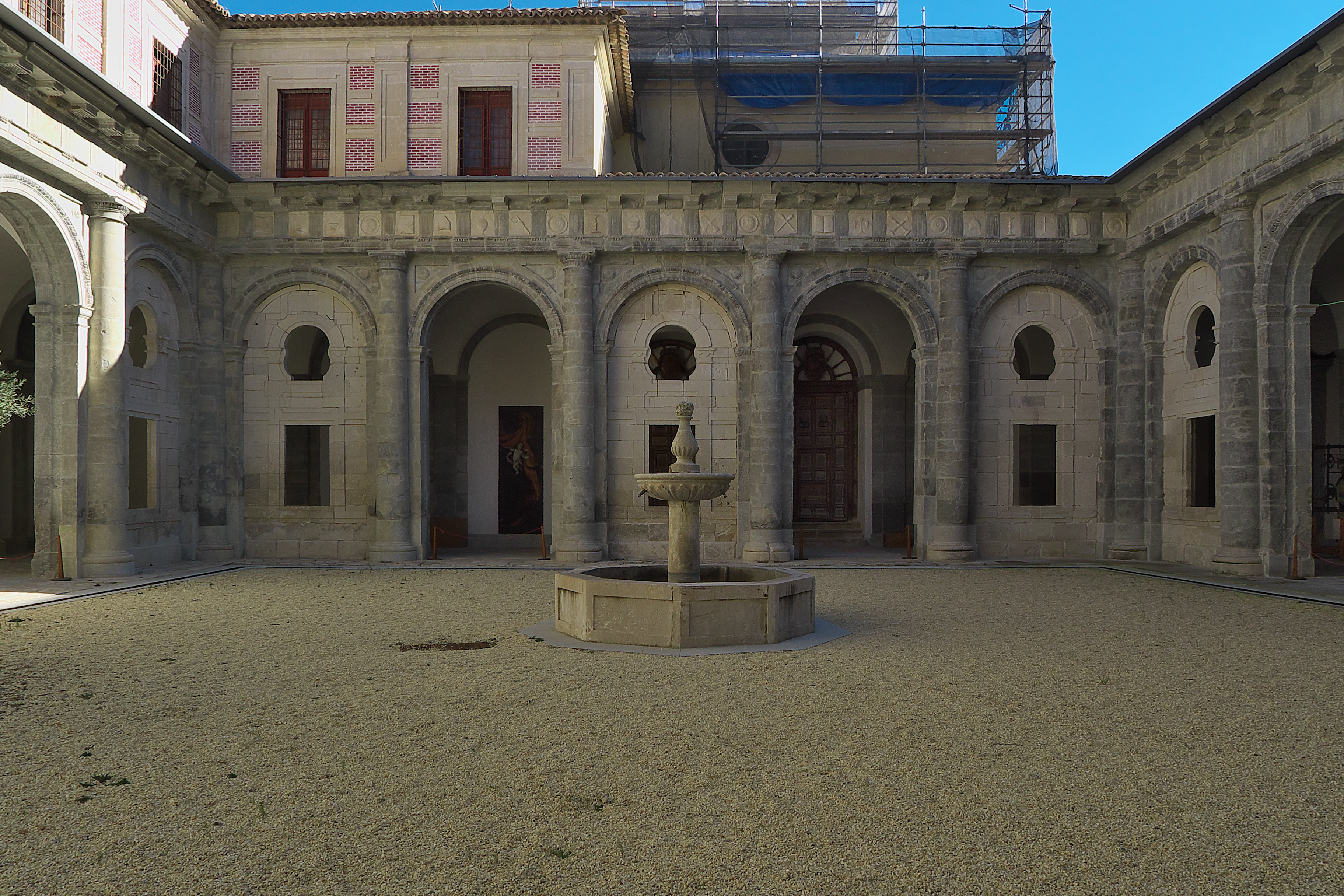 El cabildo catedralicio decide sustituir el deteriorado claustro gótico. Después de algunos proyectos, el obispo de Cuenca, Gaspar de Quiroga y Vela (1571-1577), influyente en la corte de Felipe II, consigue unas trazas del arquitecto real Juan de Herrera (1574), que fueron ejecutadas por el cantero Juan Andrea Rodi (1577).